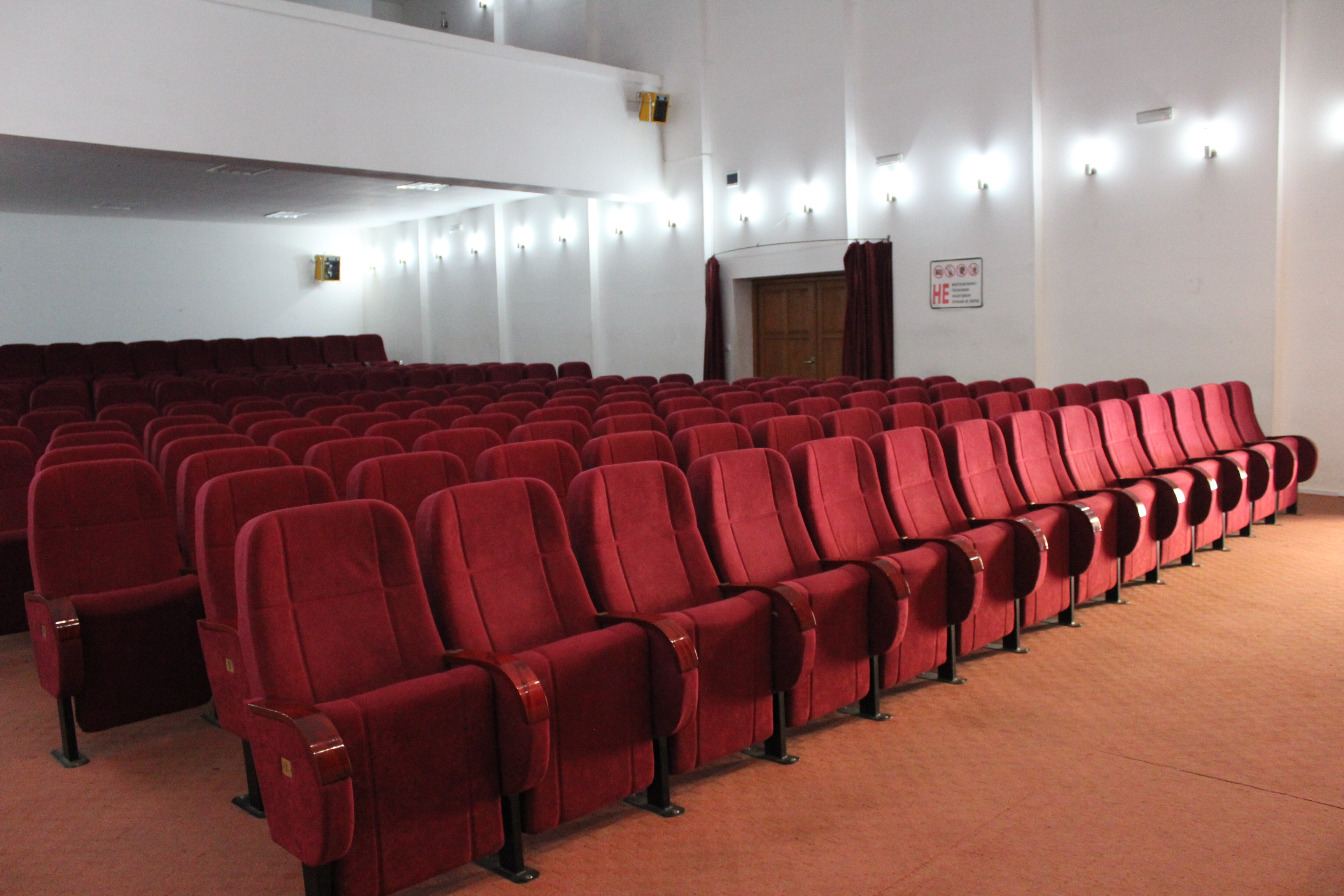 Градско народно позориште Фоча -унутрашњост